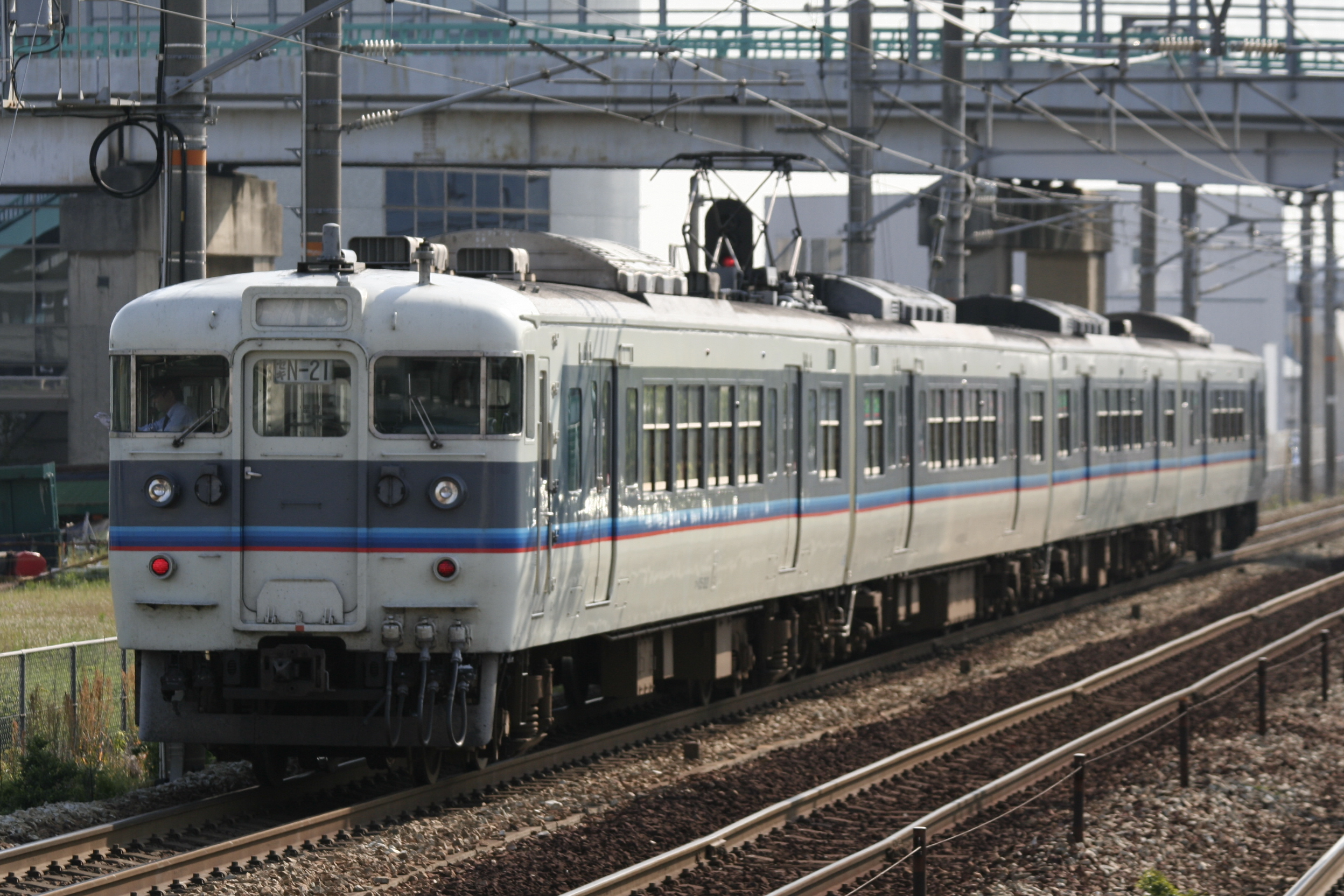 115系広島・新・快速色(最後までこの塗色だったN21編成)